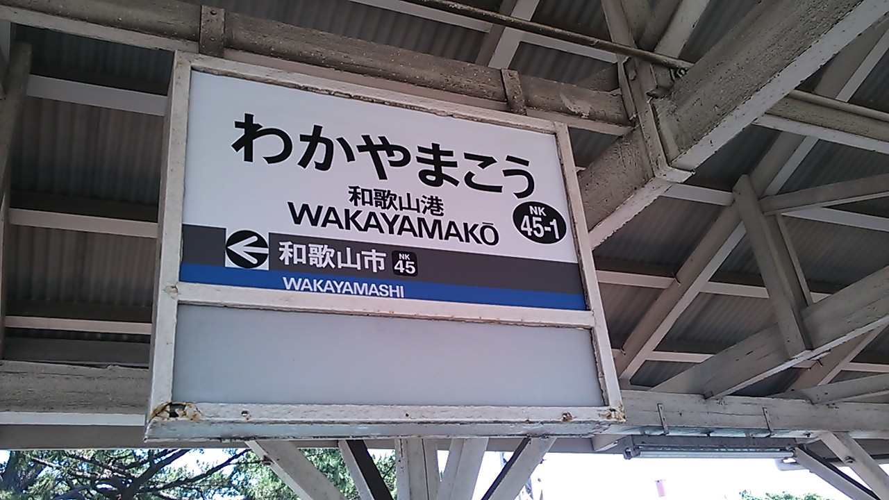 和歌山港駅 駅名標（2013年現在）